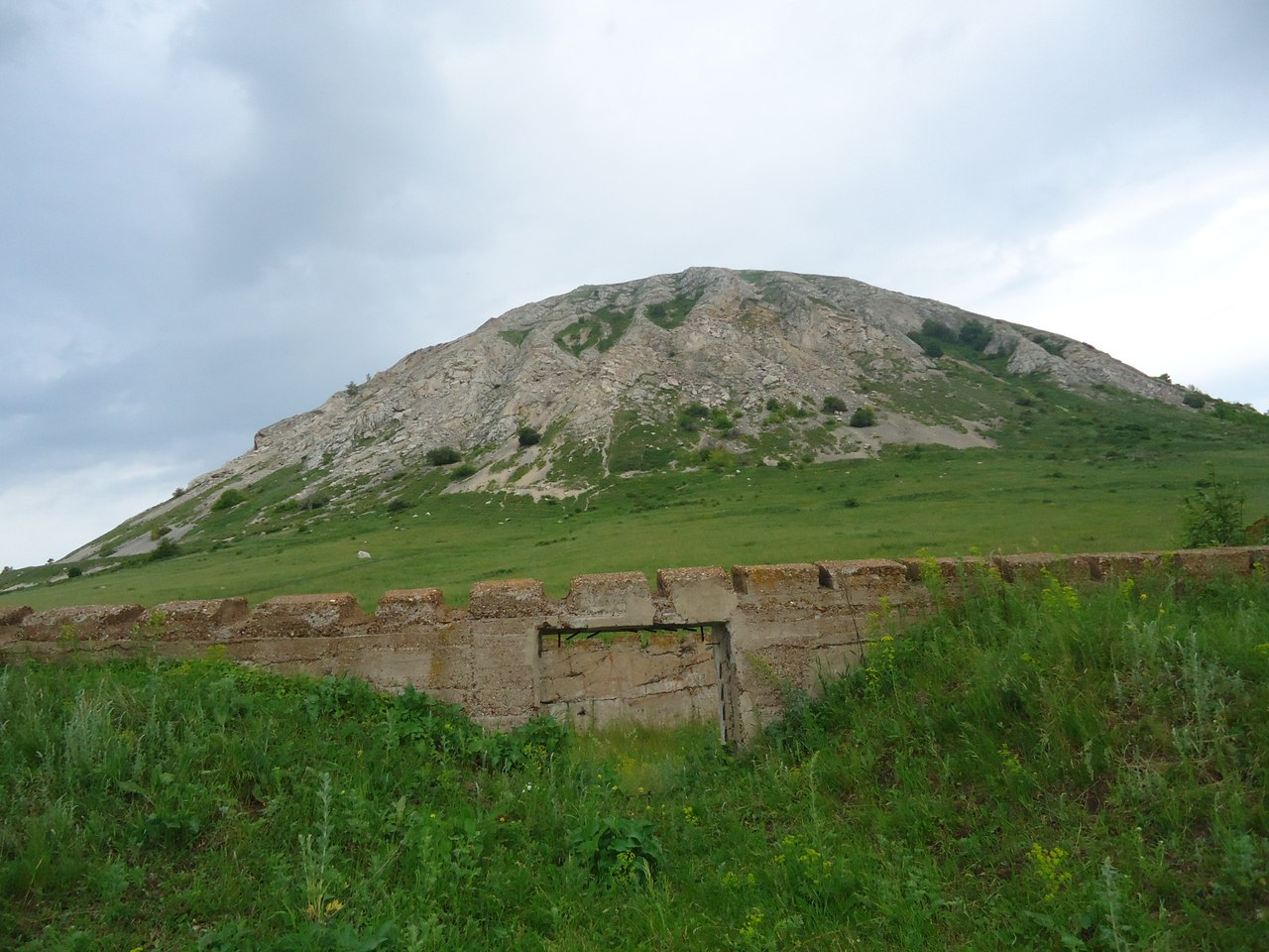 Башҡортса: Немец әсирҙәре барактарҙа Торатау итәгендә йәшәгән.